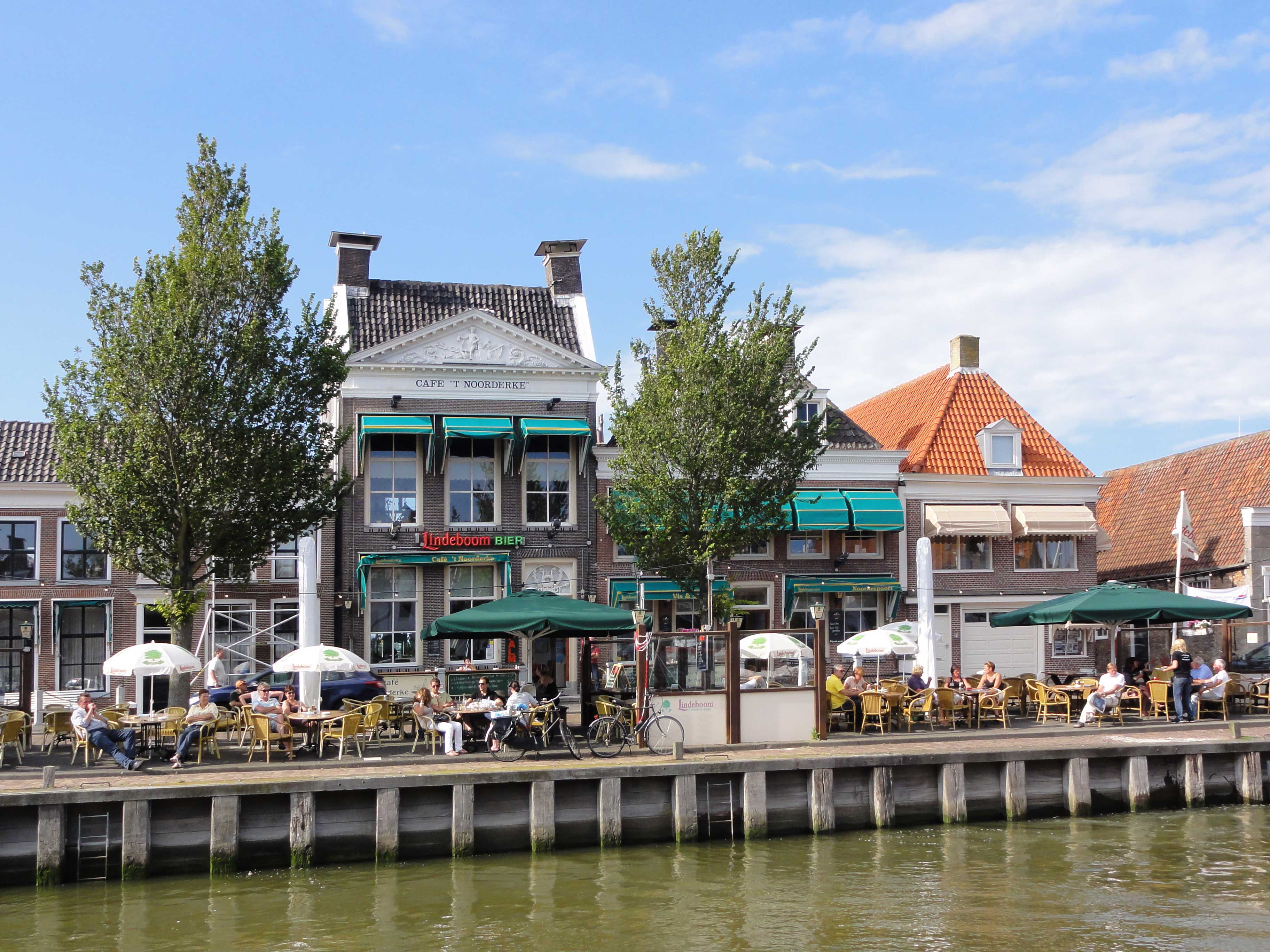 Aan de overzijde van het water de panden Noorderhaven 17 en 19